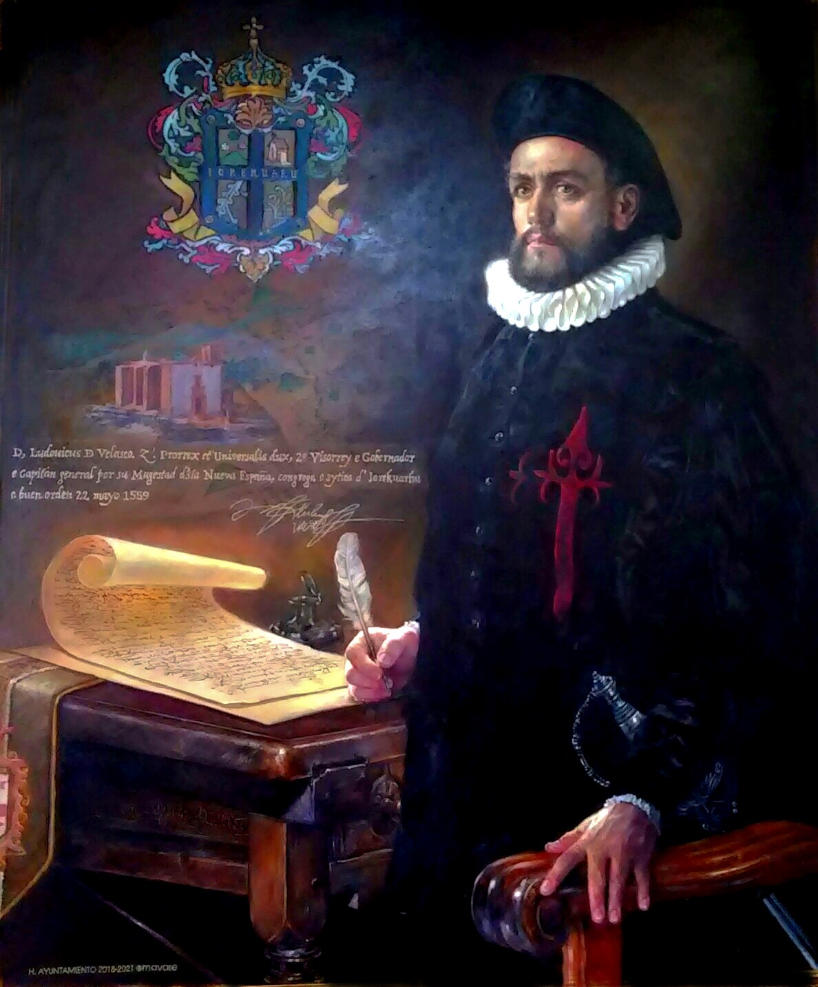 Cuadro que representa al virrey Luis de Velasco y la fundación de Yurécuaro